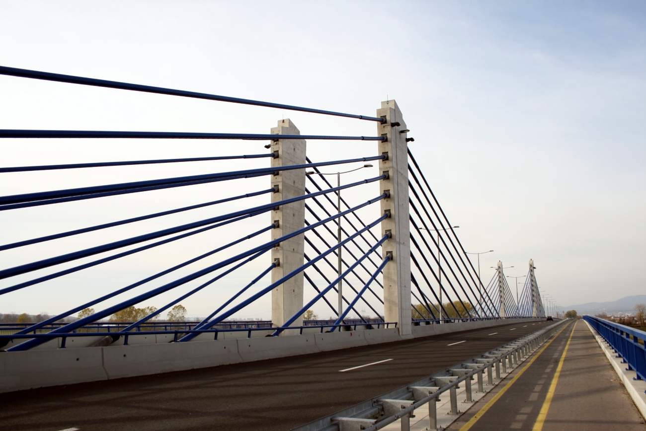 Domovniski most, Zagreb, Hrvatska